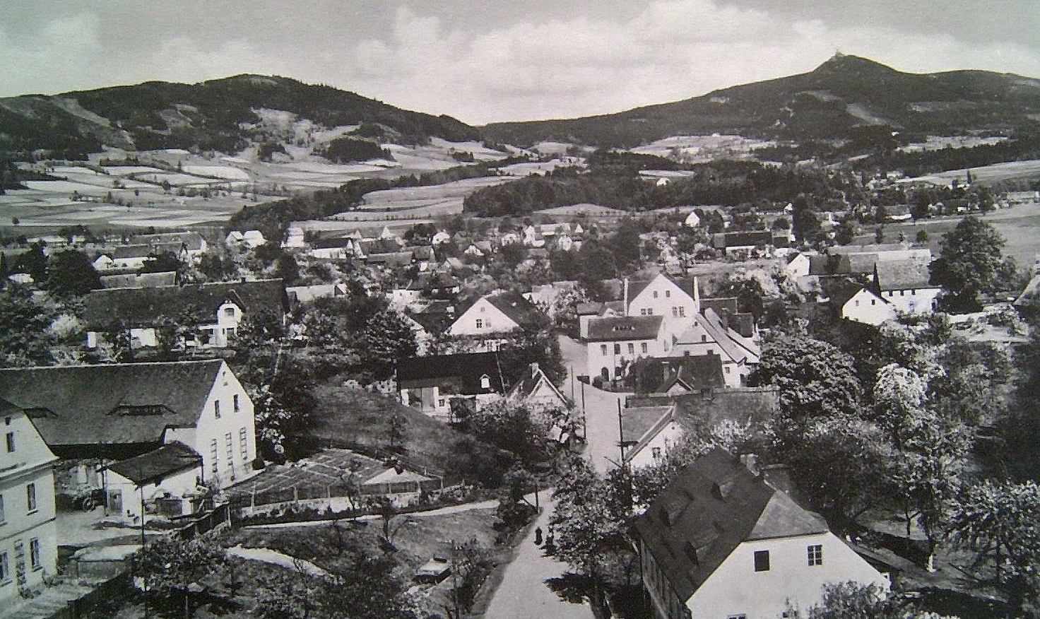 Křižany (Kriesdorf) mit Ještěd (Jeschken)